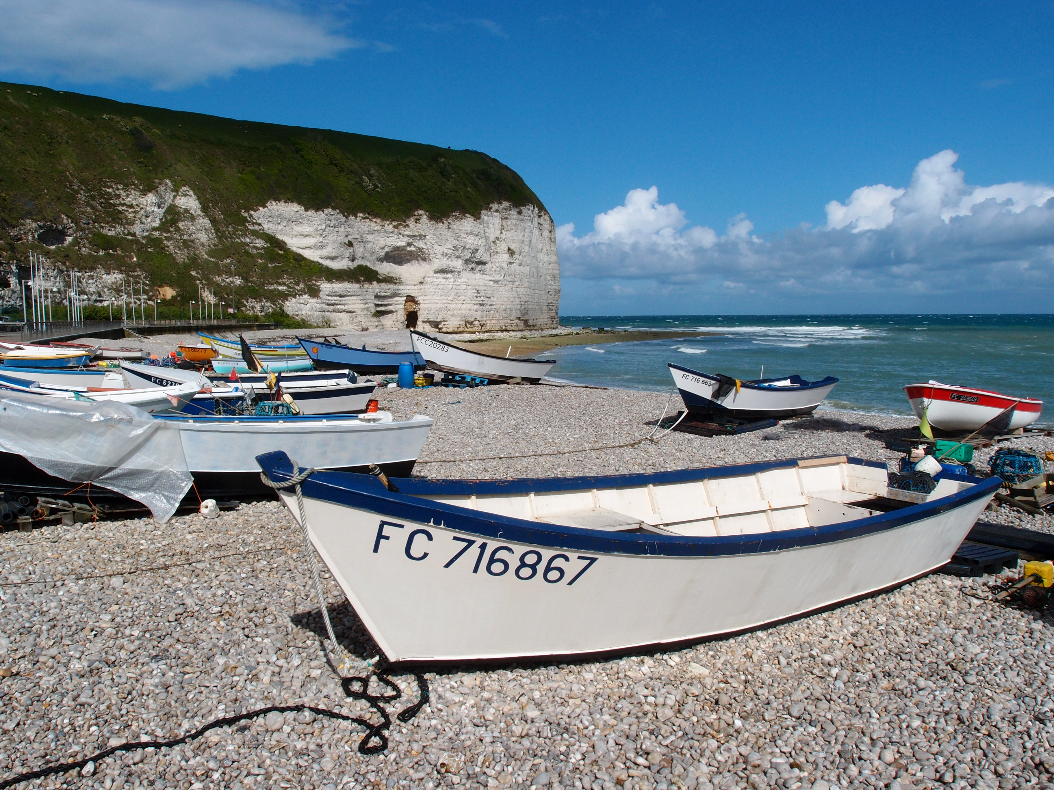 Yport: Fischerboote am Kieselstrand Datum: 15.05.2012 Urheber: M. Pfeiffer alias Benutzer:Gordito1869 Quelle: privates Fotoarchiv des Urhebers